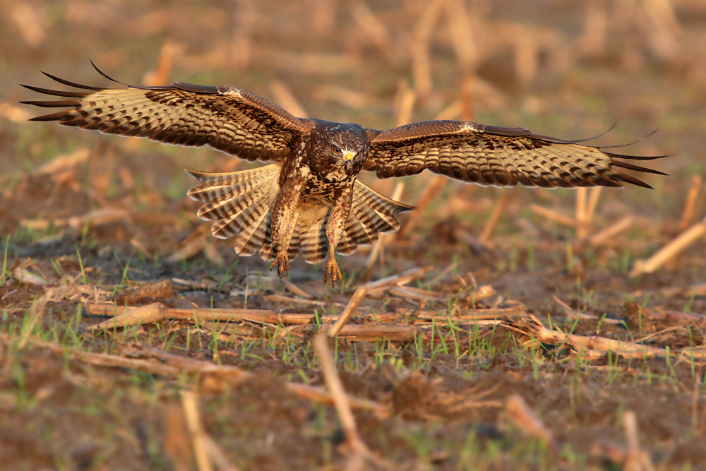 Mäusebussard in der Nähe des Ilkerbruchs